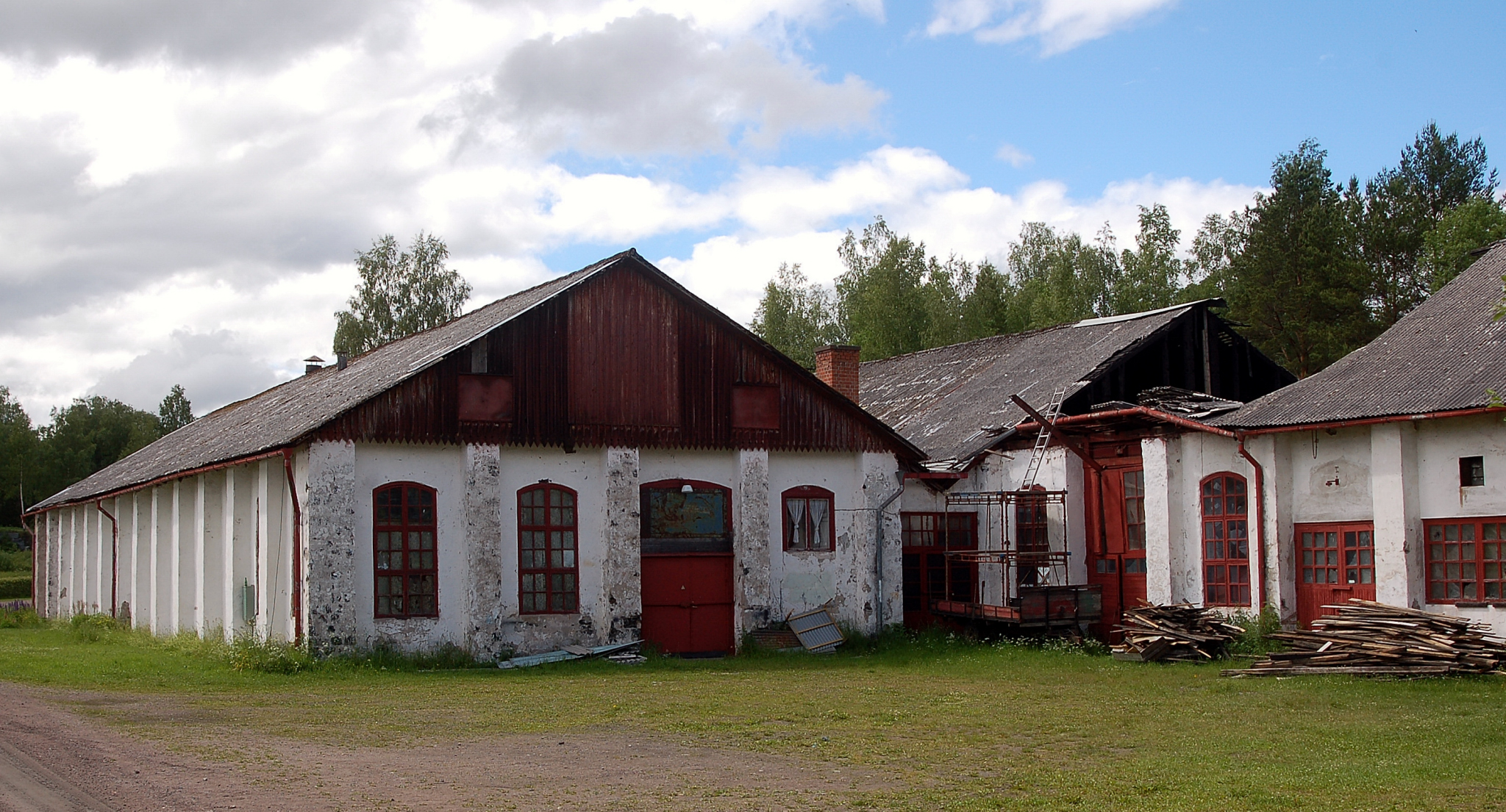 Smedjan vid Svartå Bruk, Sverige